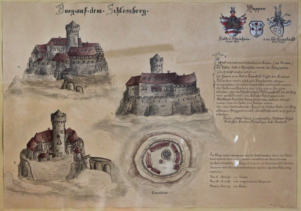 Ehemaliges Schloß in Nieder Modau